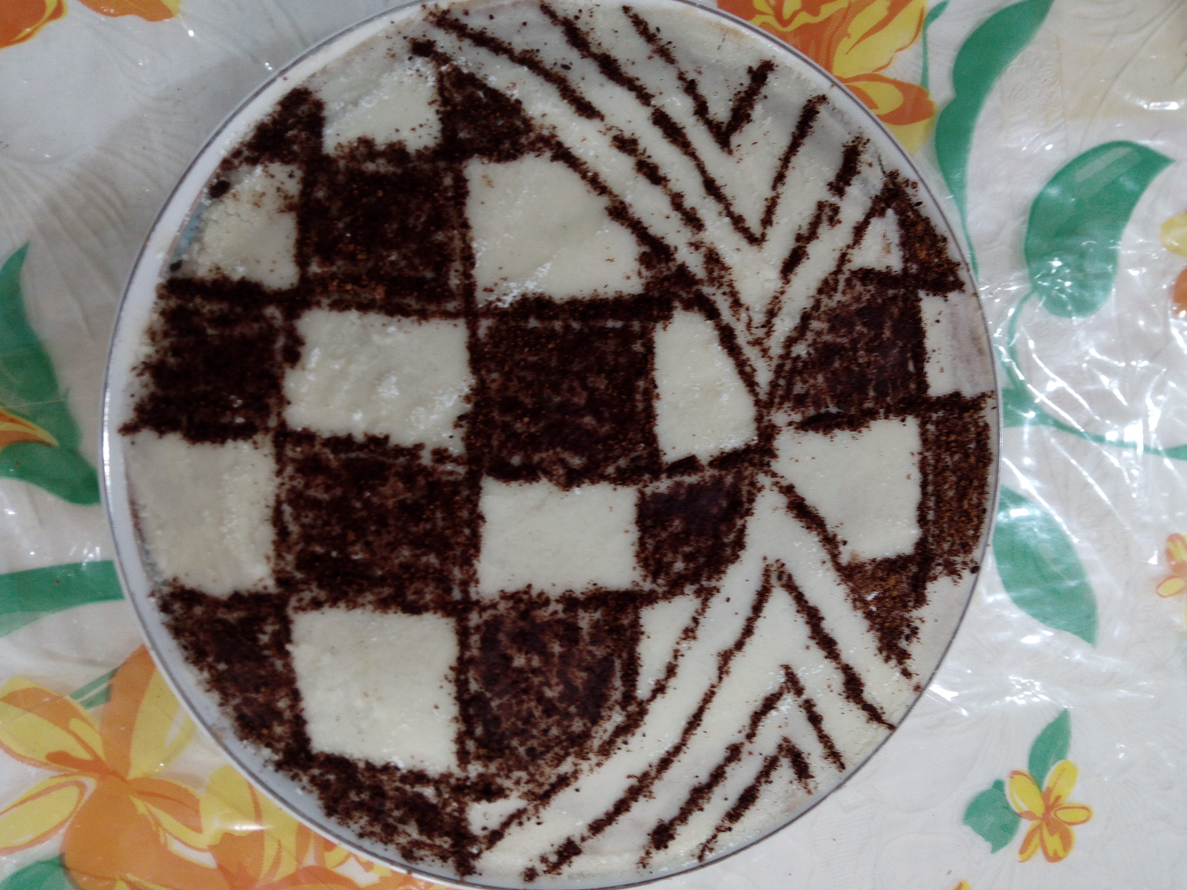 رنگینک (دشتی)